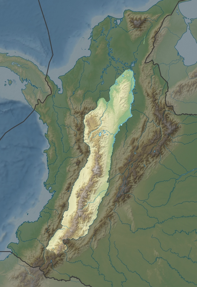 Cordillère Centrale en Colombie